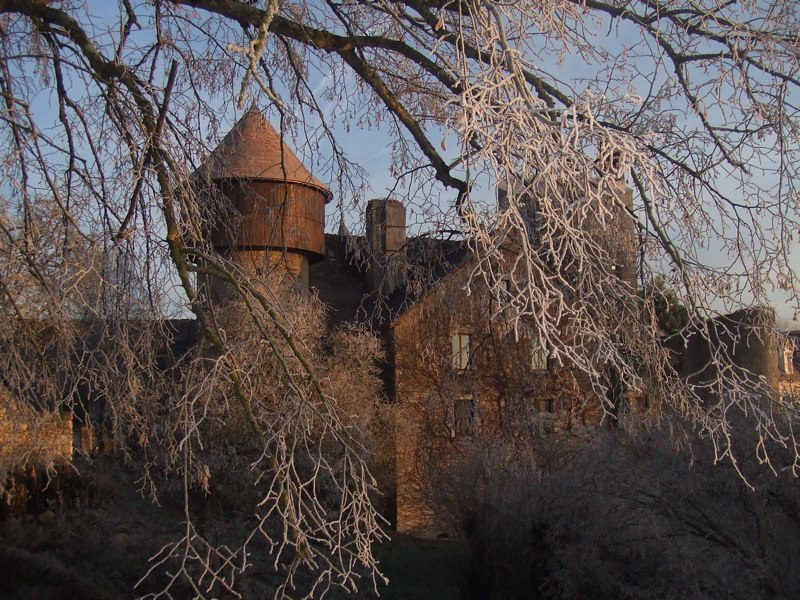 Le chateau d'Ingrandes en Hiver.